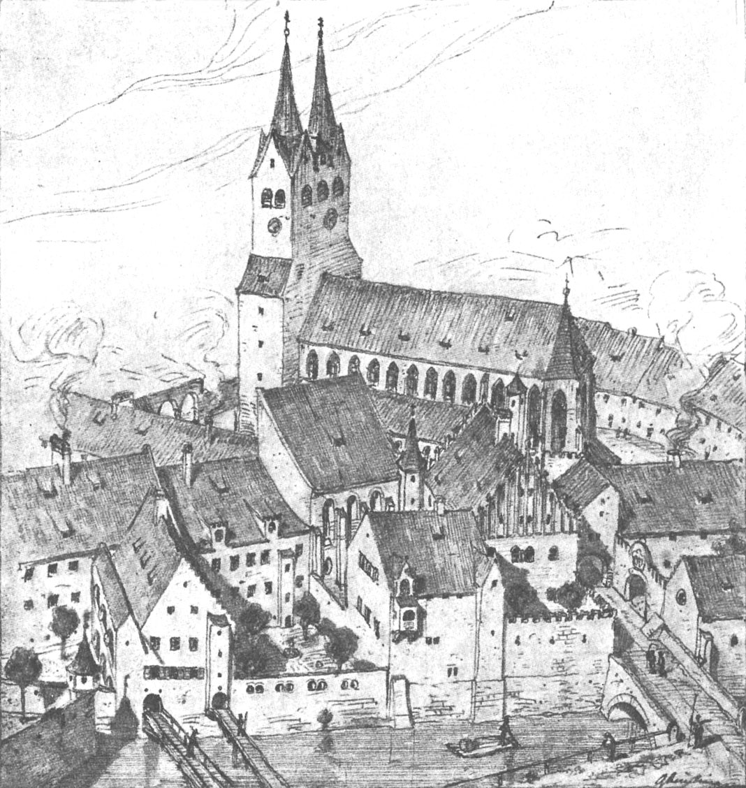 Das Petersbergl nach dem Sandnerischen Modell gezeichnet